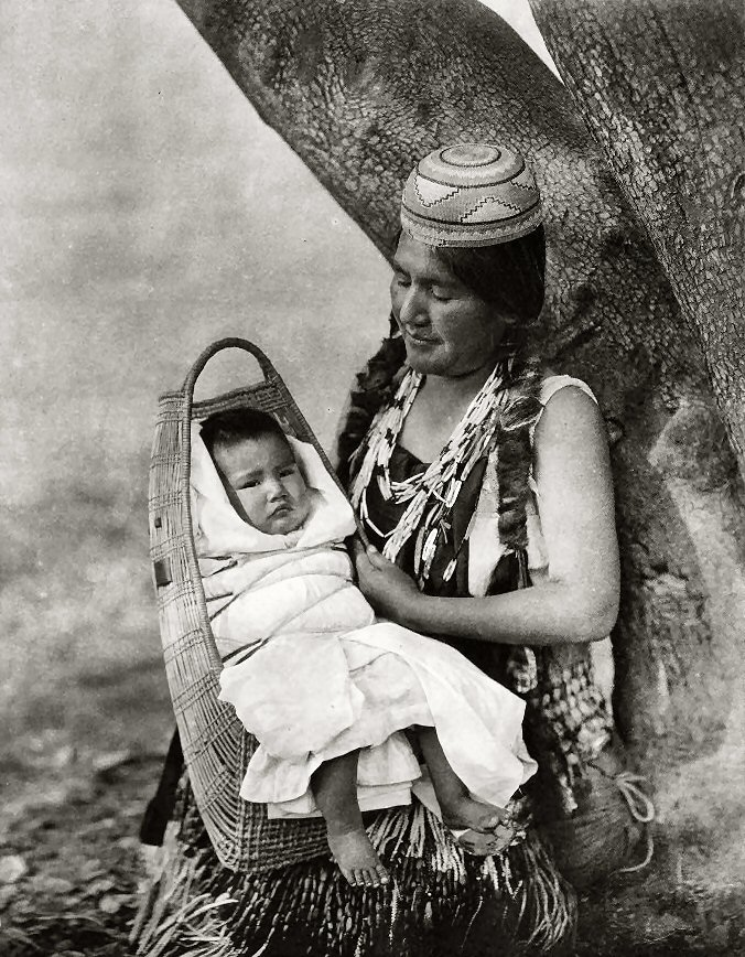 Hu pa-heimon nainen lapsensa kanssa.